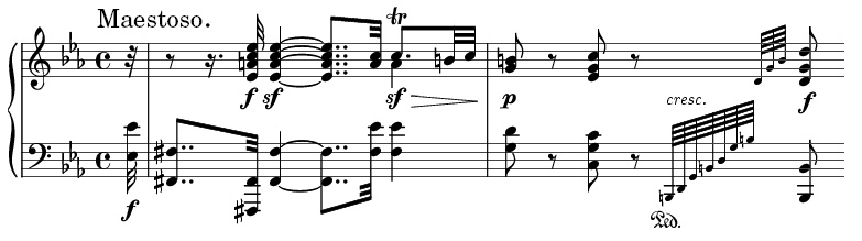 Mesures introductives de la Sonate pour piano nº 32, opus 111, de Ludwig van Beethoven